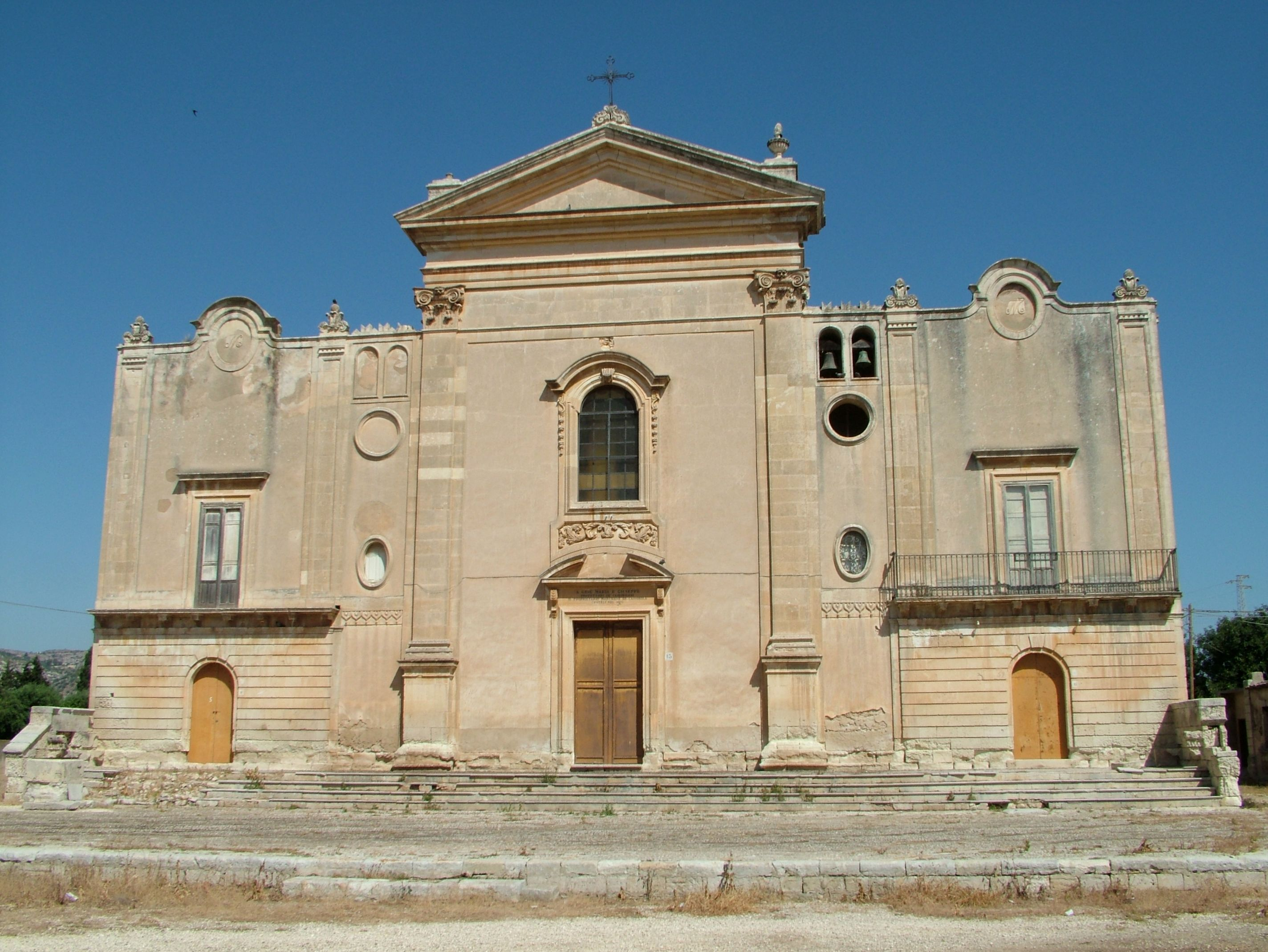 Kirche des Ortsteils Cassibile von Syrakus